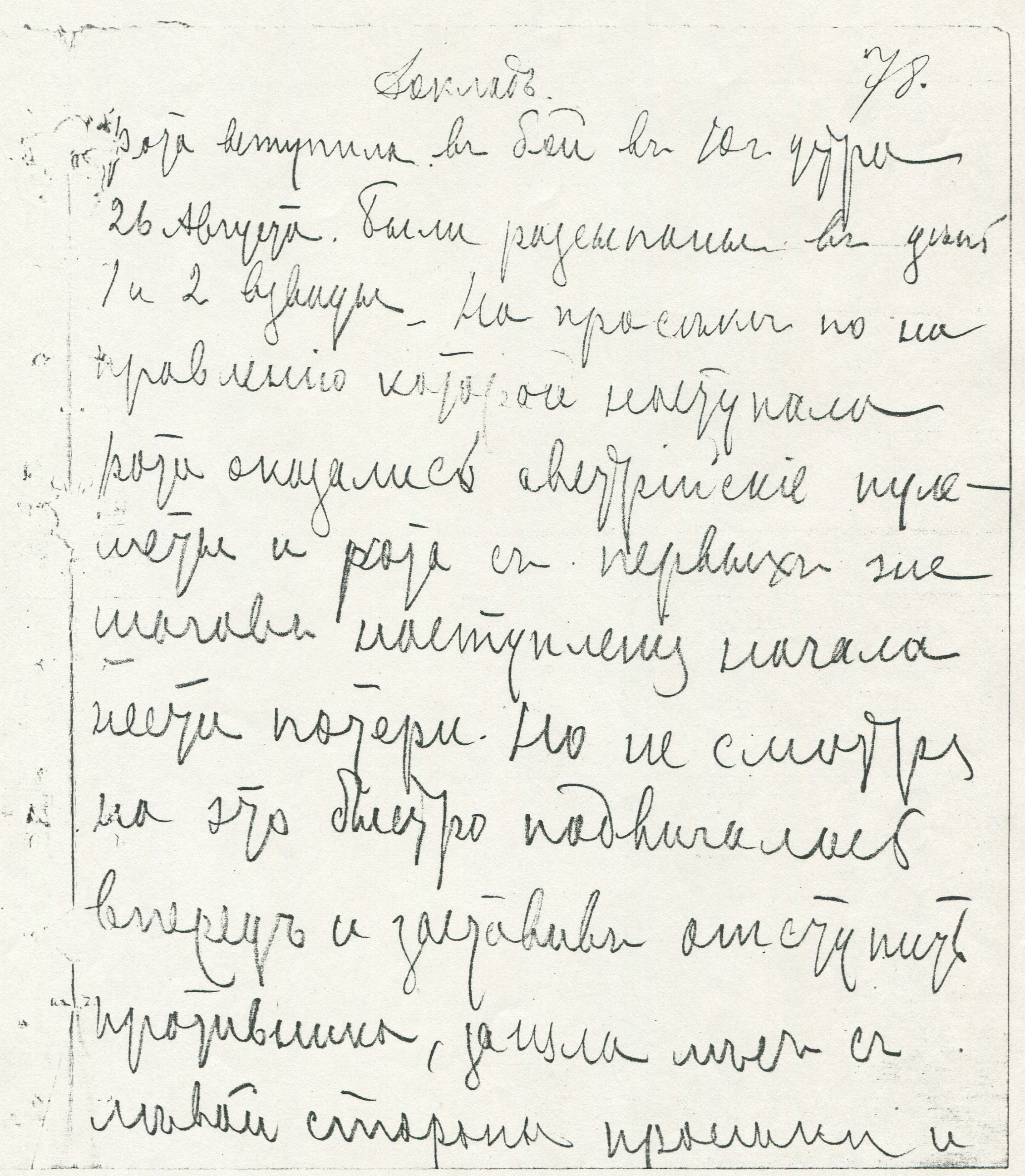 Доклад Тарапыгина П. И. о недавнем бое